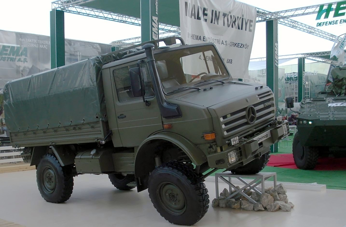 IDEF '07 Savunma Fuarı'nda çekildi. Mercedes Benz Unimog.